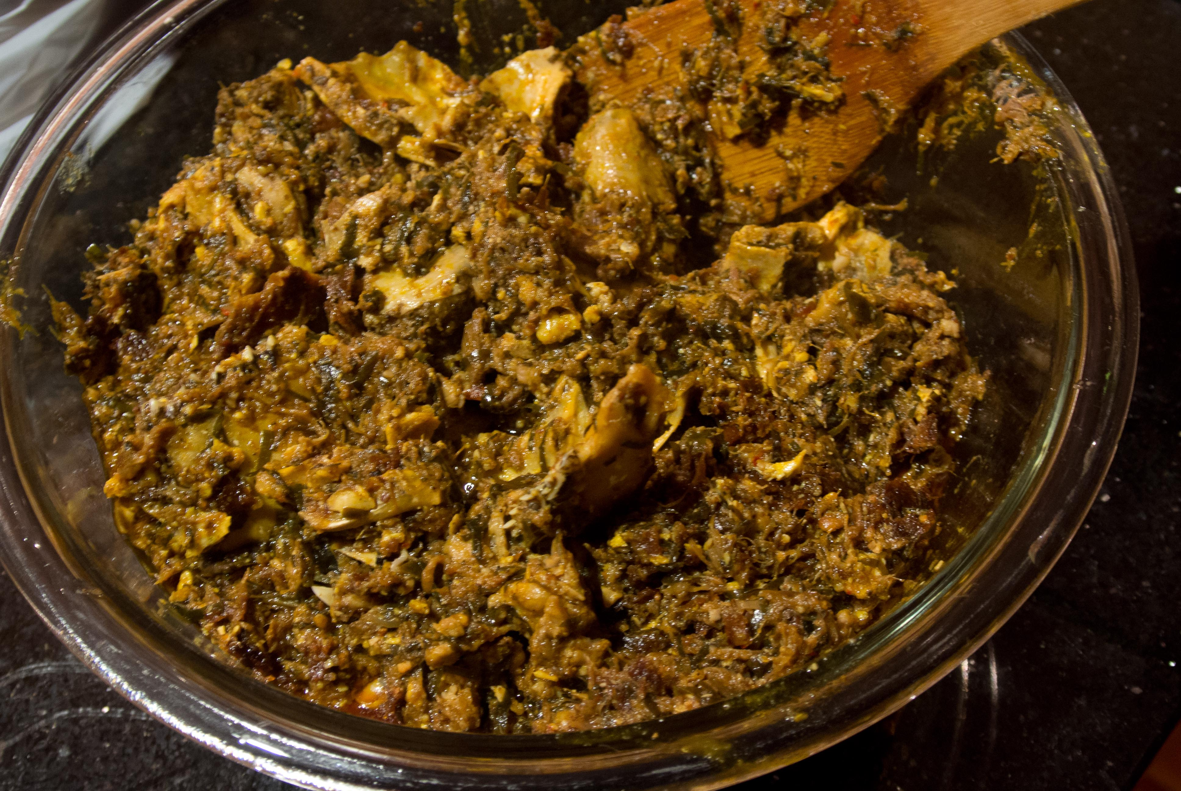 Isi Ewu